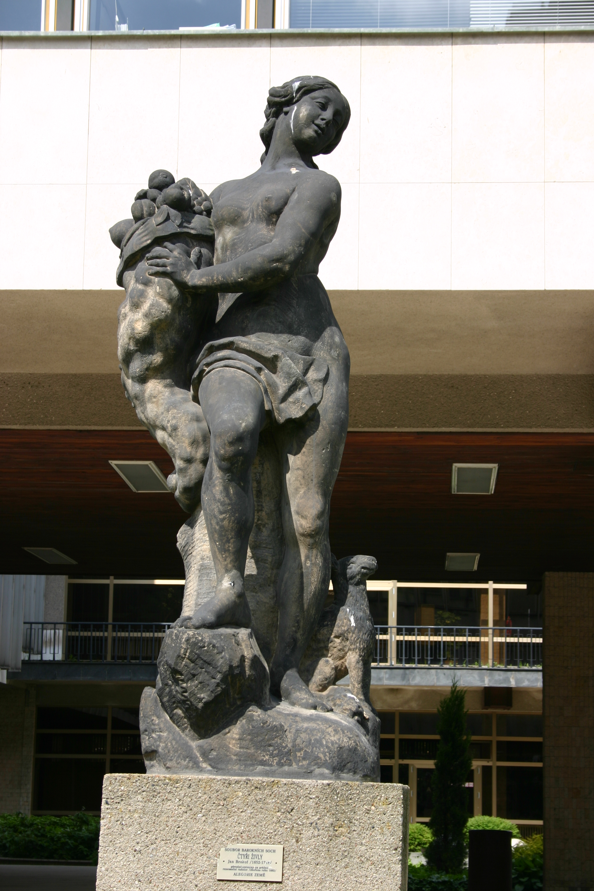 Alegorie "Země". Autor Jan Brokoff